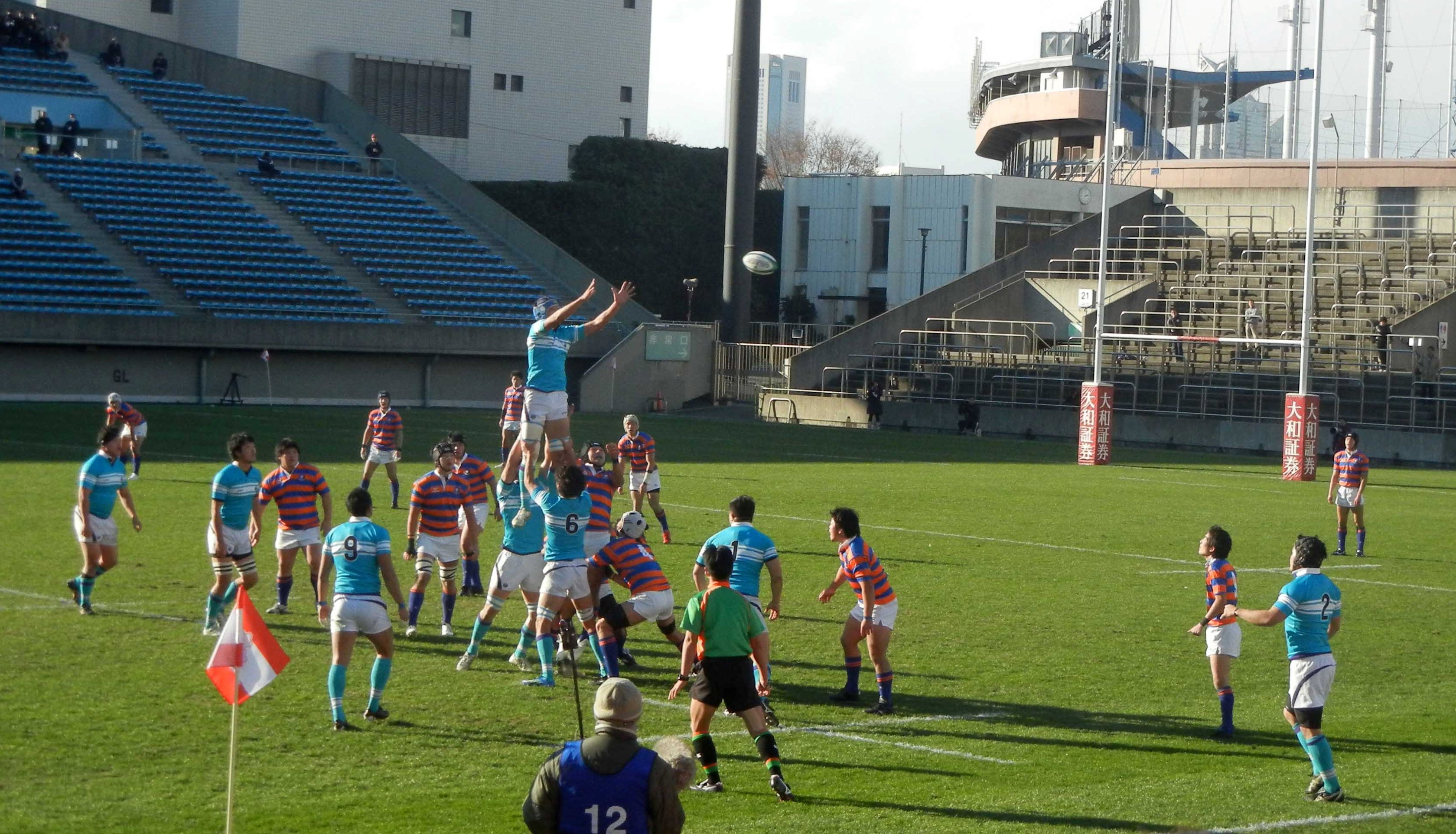 第49回大学ラグビー選手権 筑波対法政